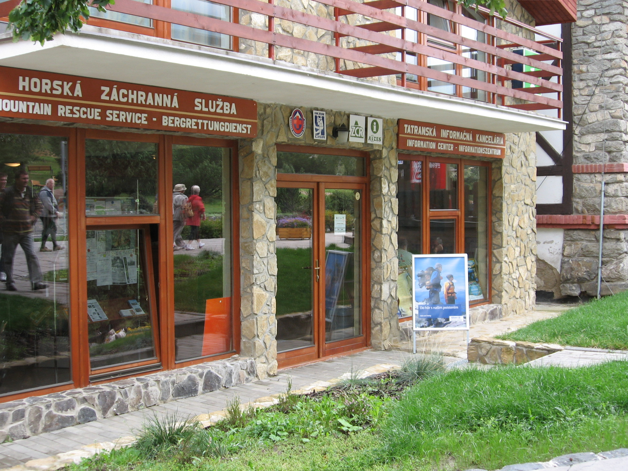 centrum Tatranskej horskej služby